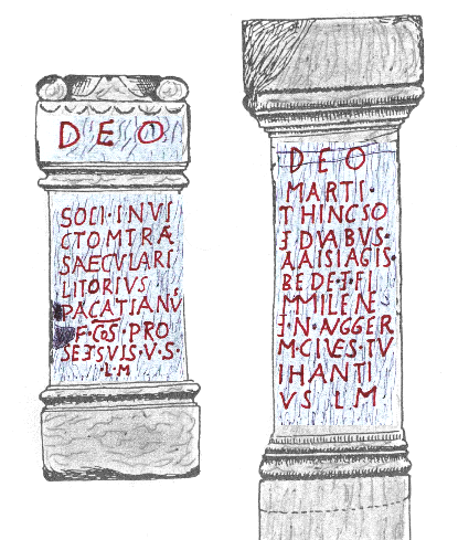 Altar des Mithras und des Mars Thincsus aus Housesteads, Hadrianswall (GB)